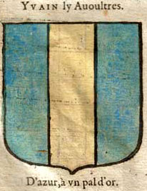 Yvain l'Avoultres